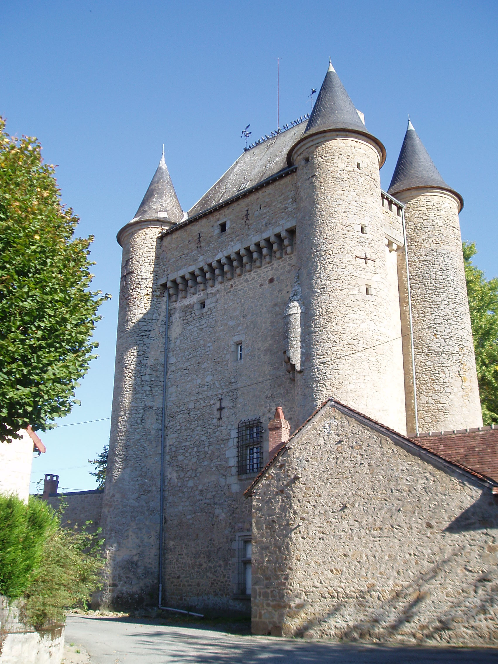 Château